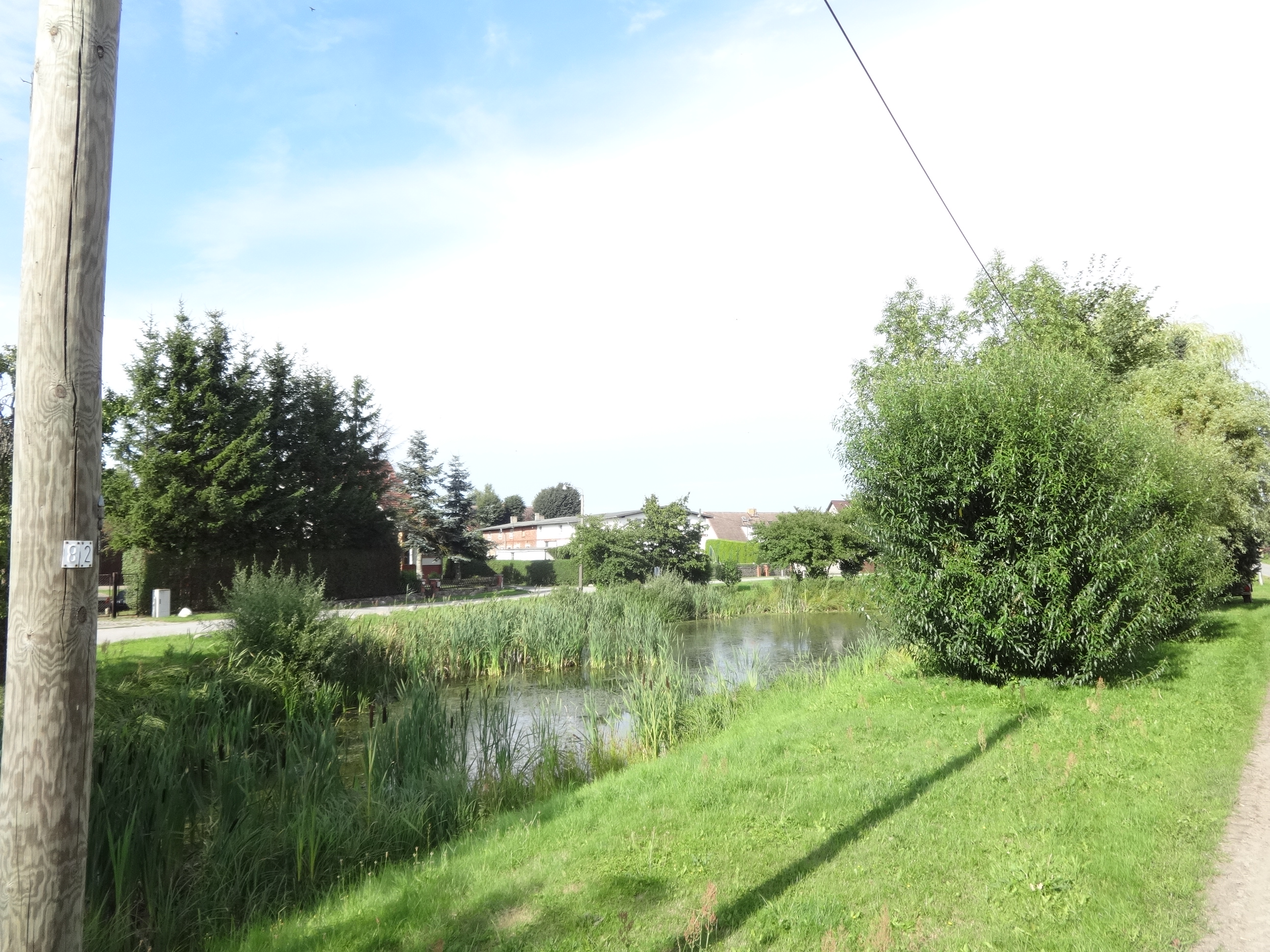 Latzow, ein Ortsteil der Gemeinde Rubenow in Mecklenburg-Vorpommern